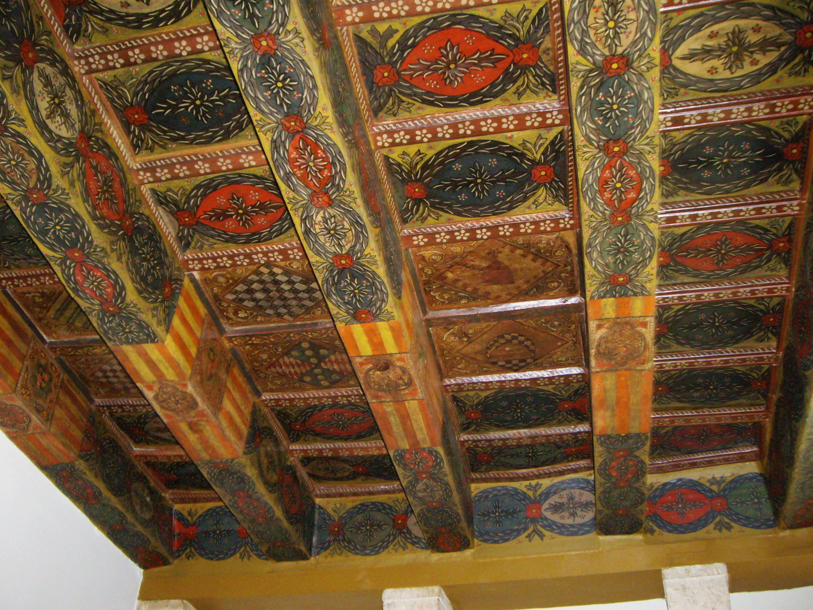 Teginat d'una habitació del Palau del l'Almirall de València.